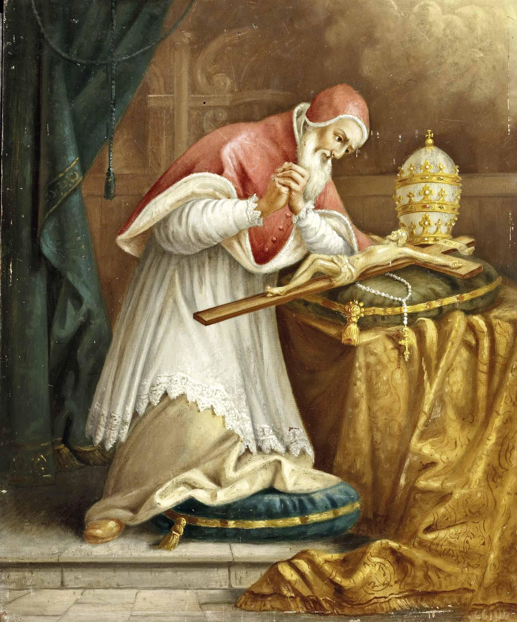 "Der Hl. Papst Pius V verehrt den Gekreuzigten" unten links signiert: Aug. Kraus, Öl auf Holz, ca. 53 x 44,5 cm